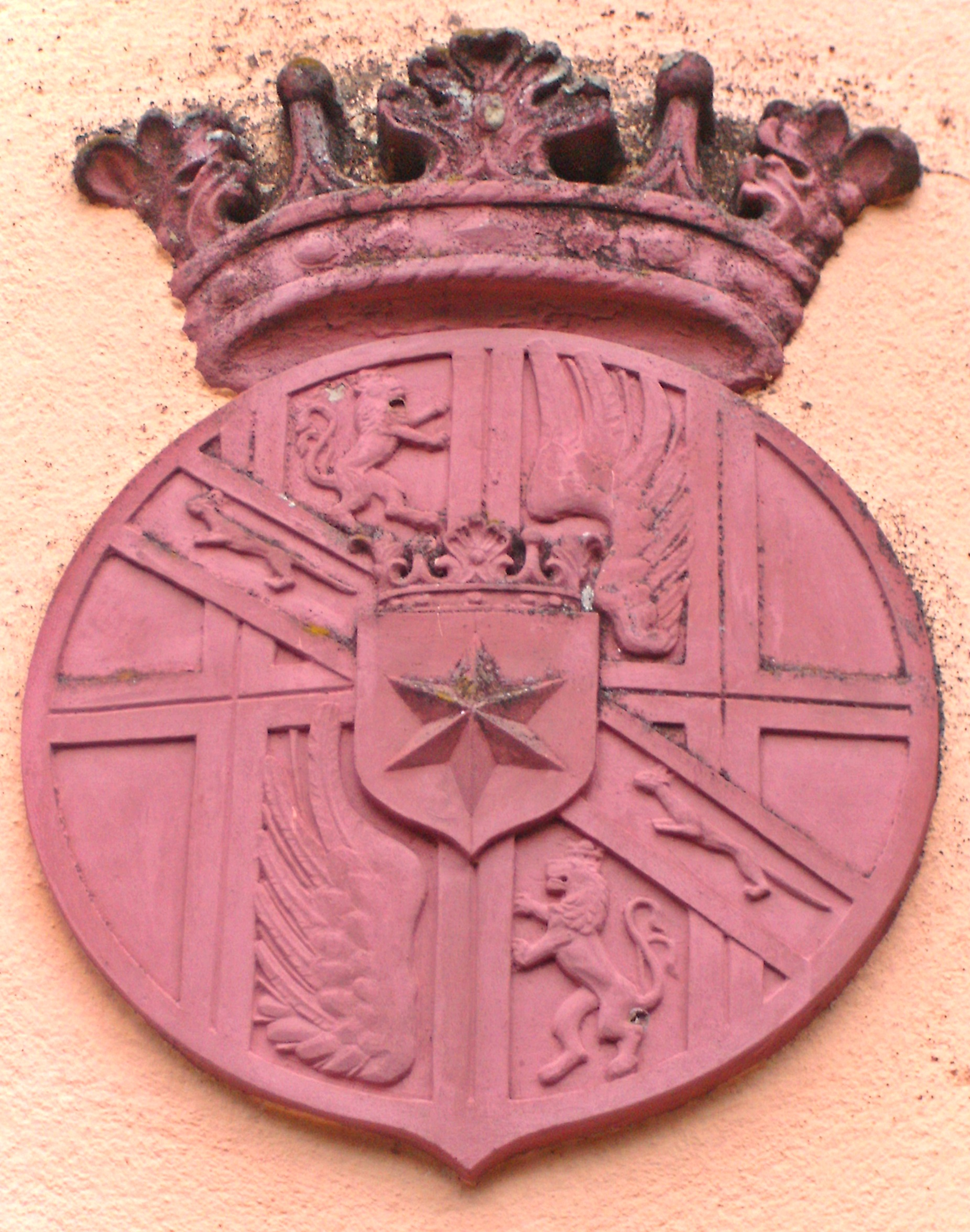 Hirschberg an der Bergstraße, Wappen der Grafen von Wiser an der Grabkapelle auf dem Friedhof